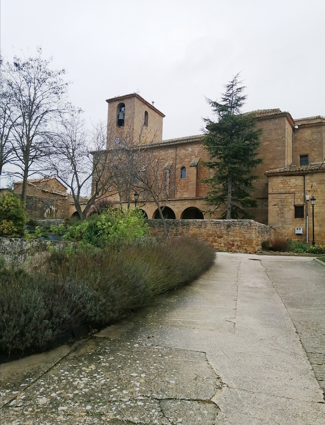 Iglesia de garinoain